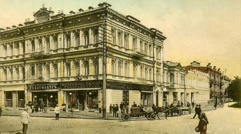 Вулиця Московська, дореволюційне фото.